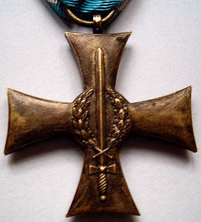 Krzyż Śląski - revert side of Polish Military Cross 1921